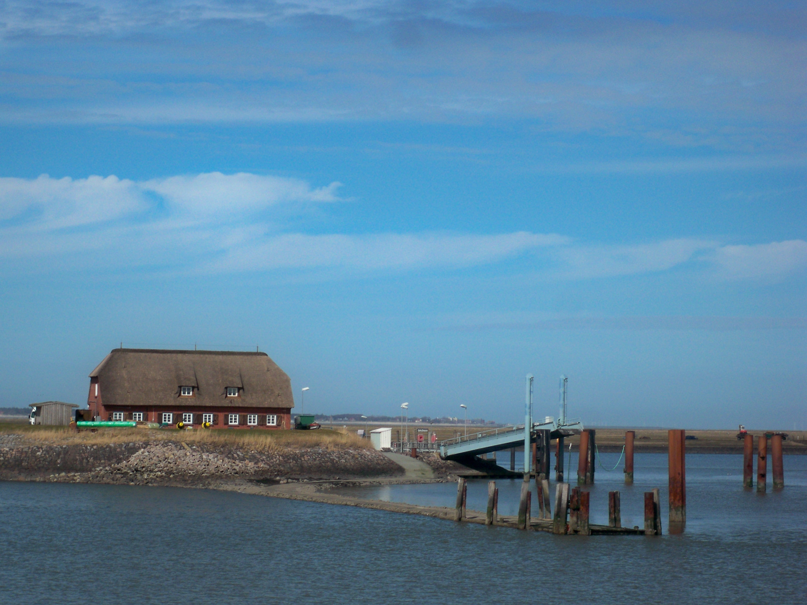 Langeneß, Schleswig-Holstein, harbour seen from the sea/Hafen vom Wasser aus gesehen